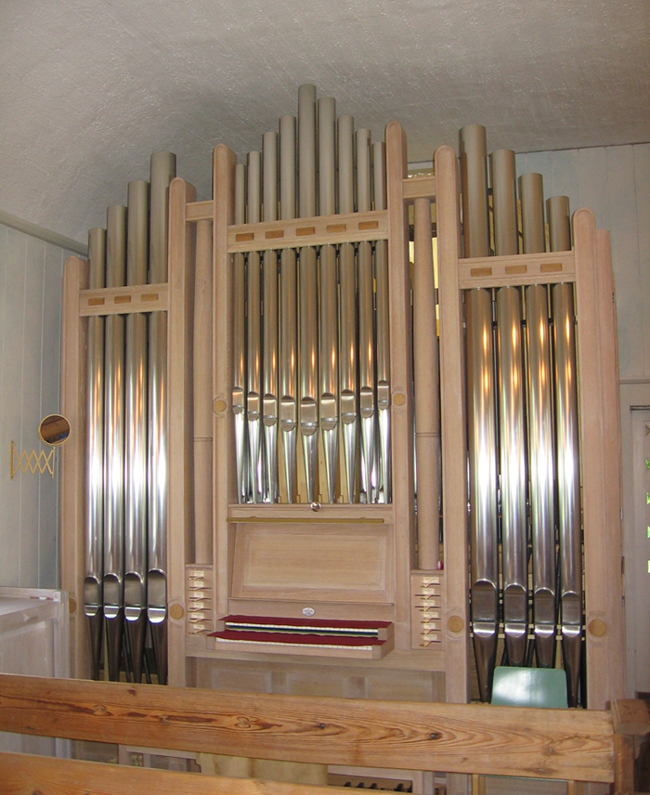 Kellokosken kirkon urut 4.6.2006.